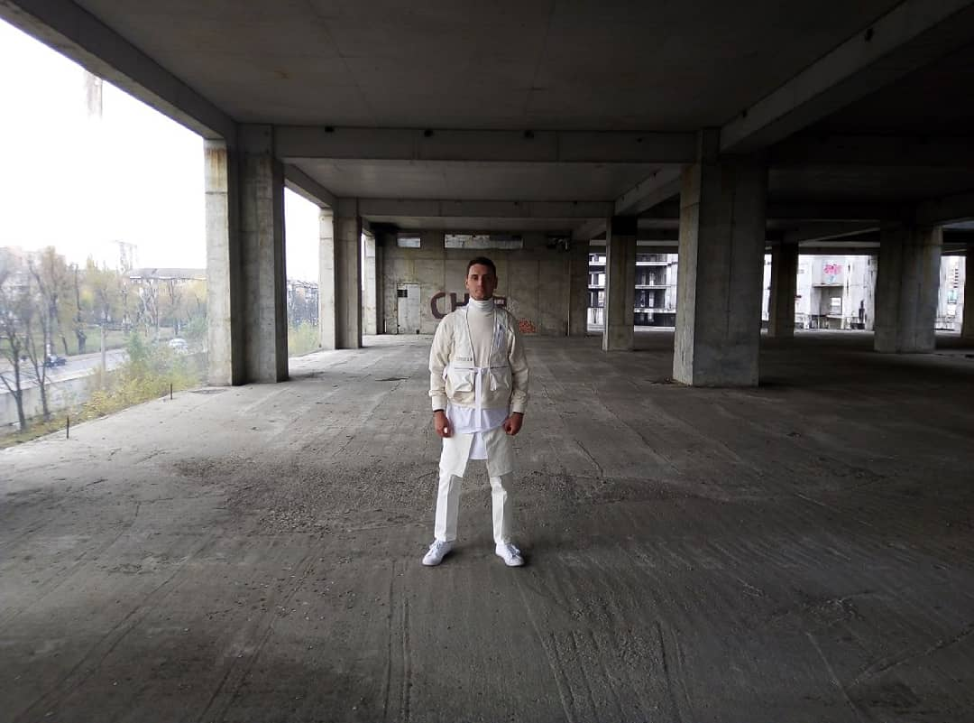 Съёмки клипа Зейна Малика